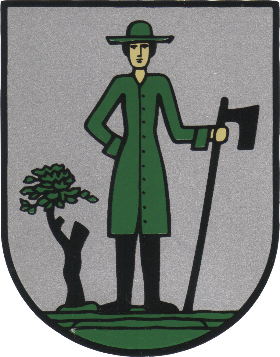 Wappen der Gemeinde Großerkmannsdorf (Ortsteil von Radeberg)